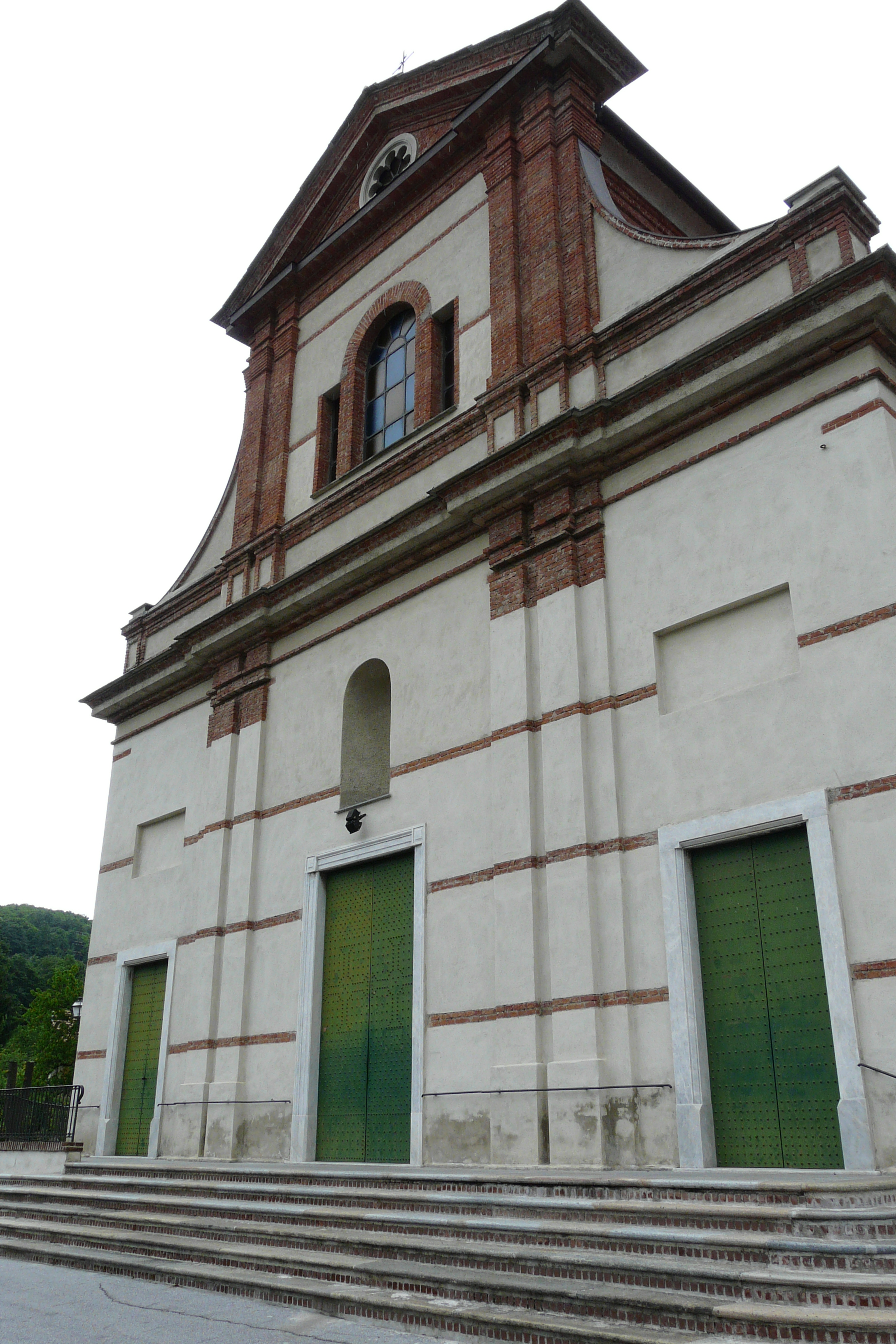 Chiesa di San Giorgio a Sarissola, Busalla, Liguria, Italia